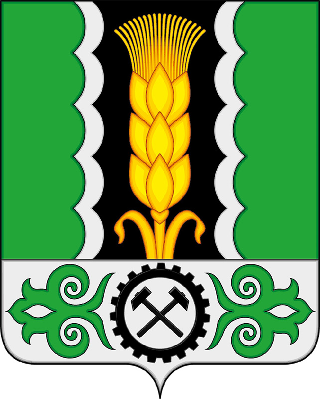 Новый герб Алтайского района